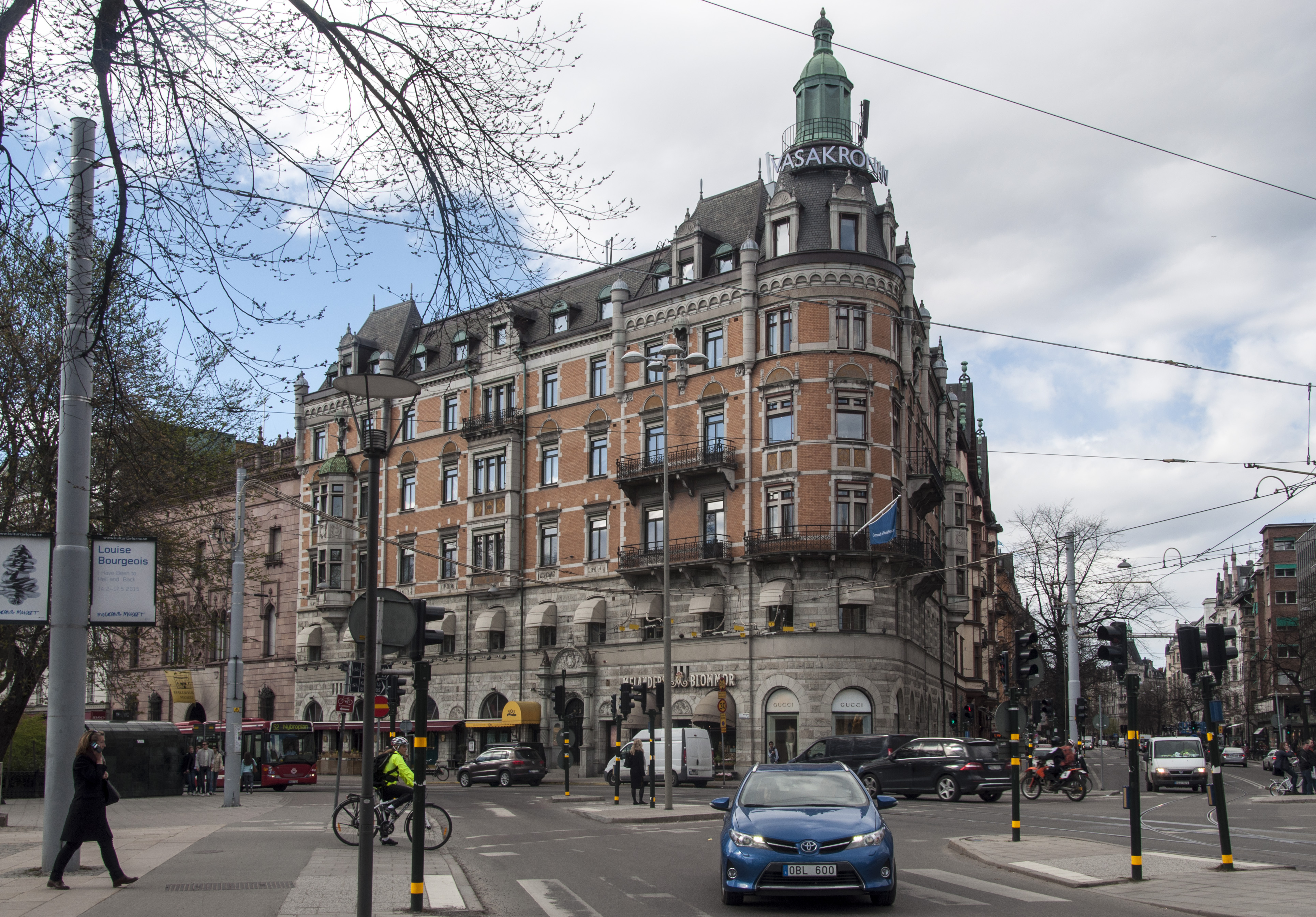 Skravelberget Mindre 12, Birger Jarlsgatan 1, Hamngatan 2, Nybyggnadsår 1892 - 1893 Nils Nilsson (Byggmästare) Nils Nilsson (Byggherre) Ullrich Fritz & Hallquisth Edvard (Arkitekt)